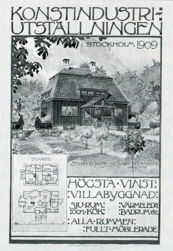 Lotterivillan på Konstindustriutställningen 1909, arkitekt Ivar Callmander (affisch)